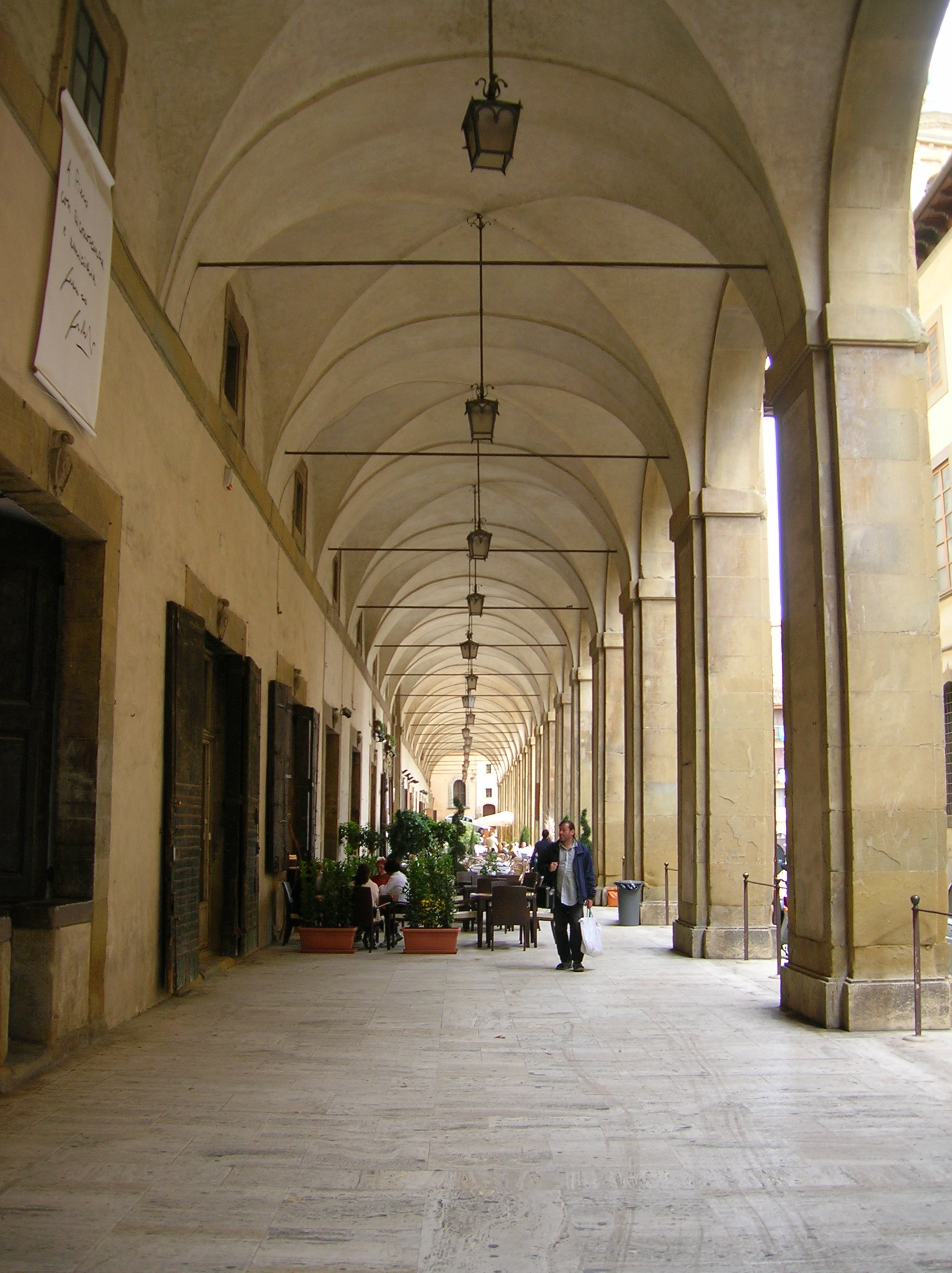 La loge de Vasari à Arezzo, près de la Piazza Grande